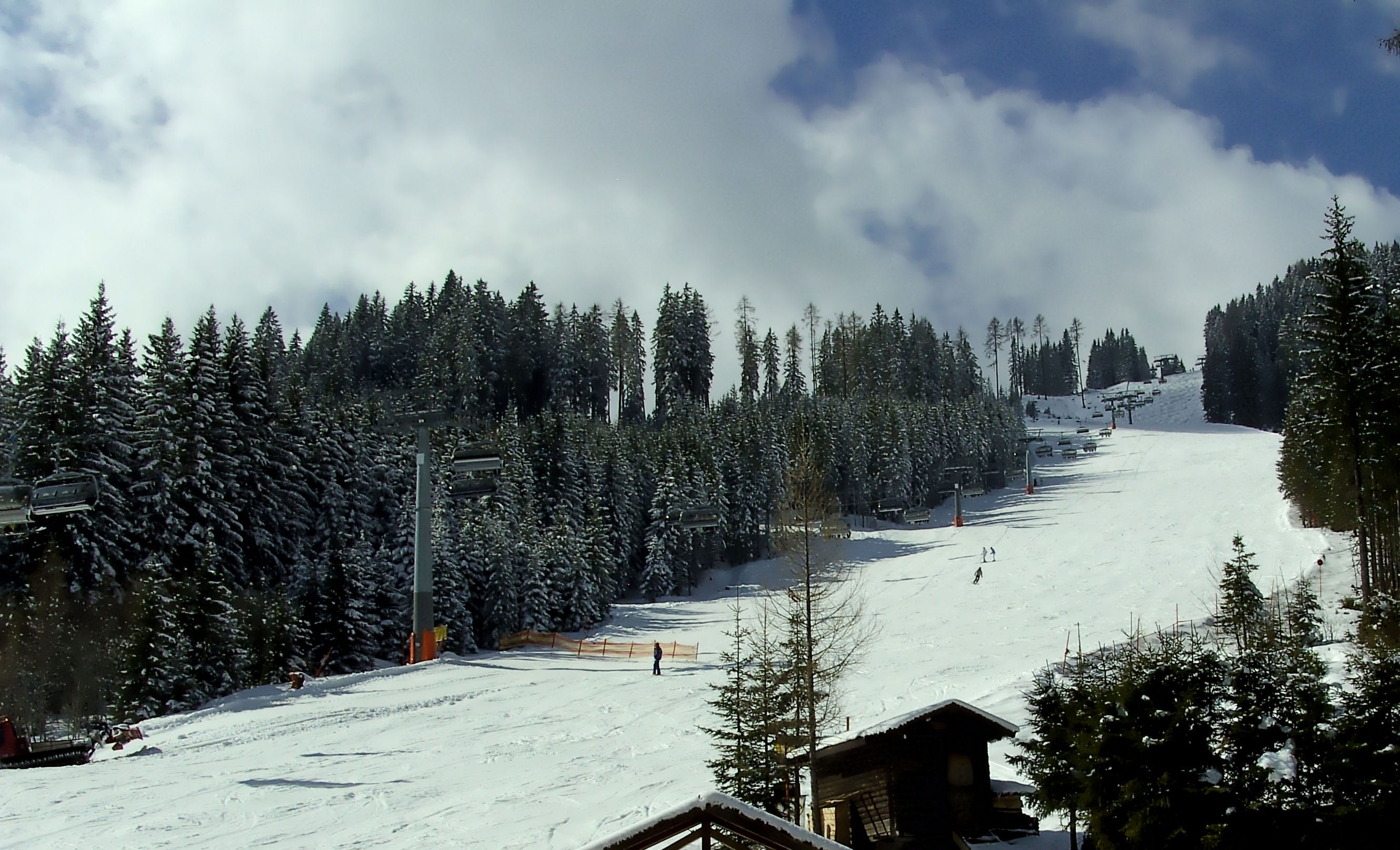 Piste des Skigebiets Großarl.